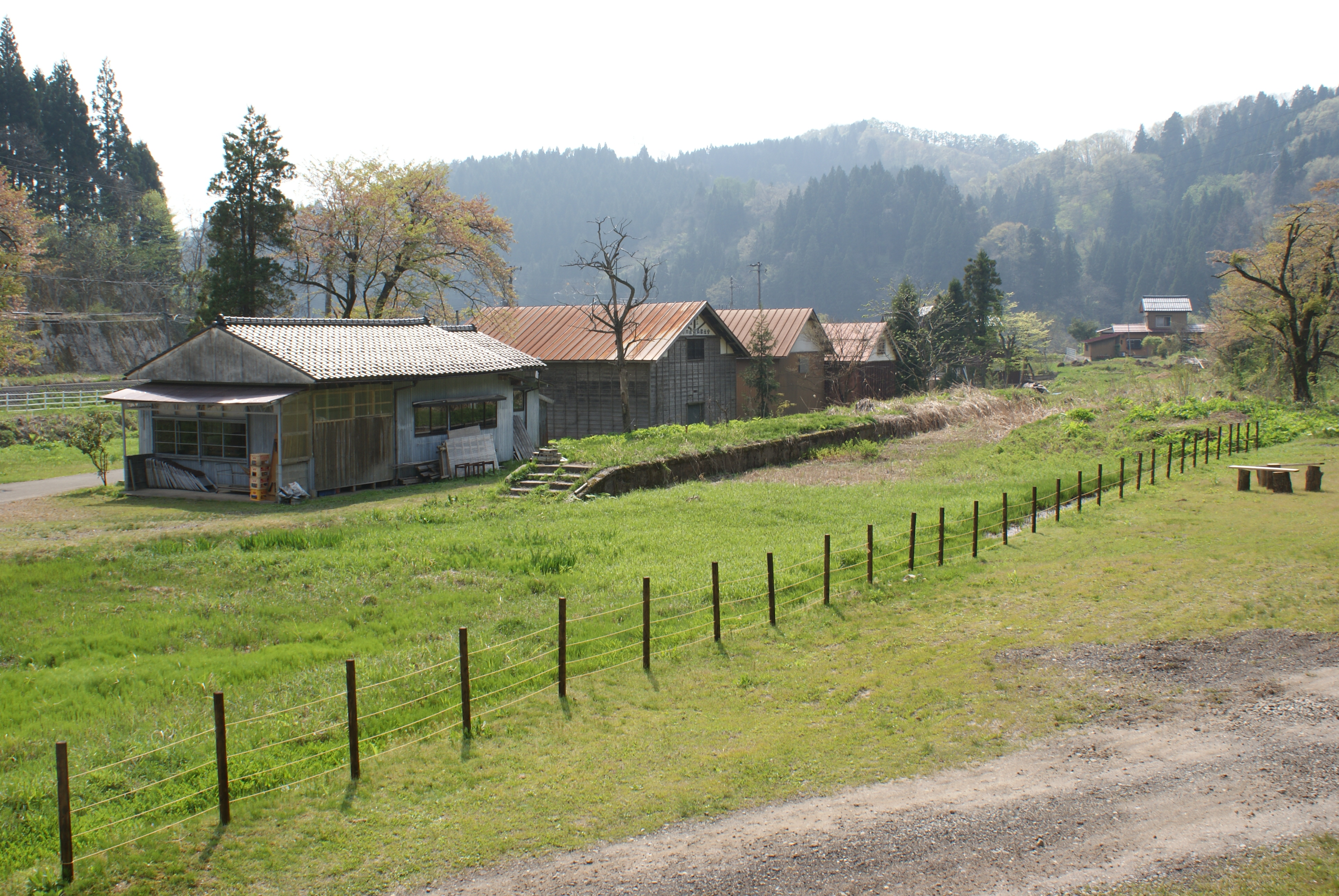 旧蒲原鉄道七谷駅跡